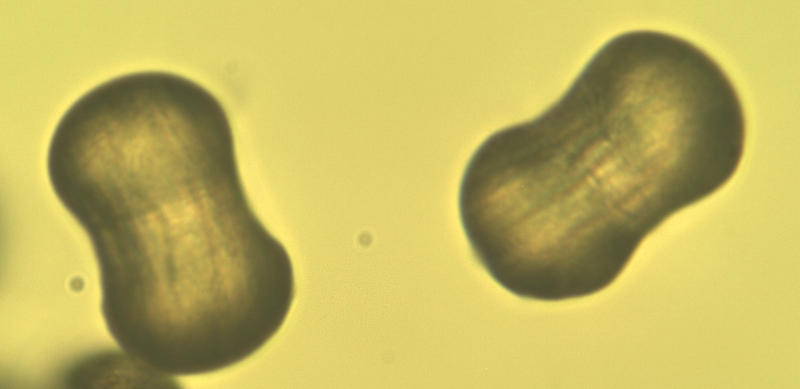 Borago officinalis Pollen 400x